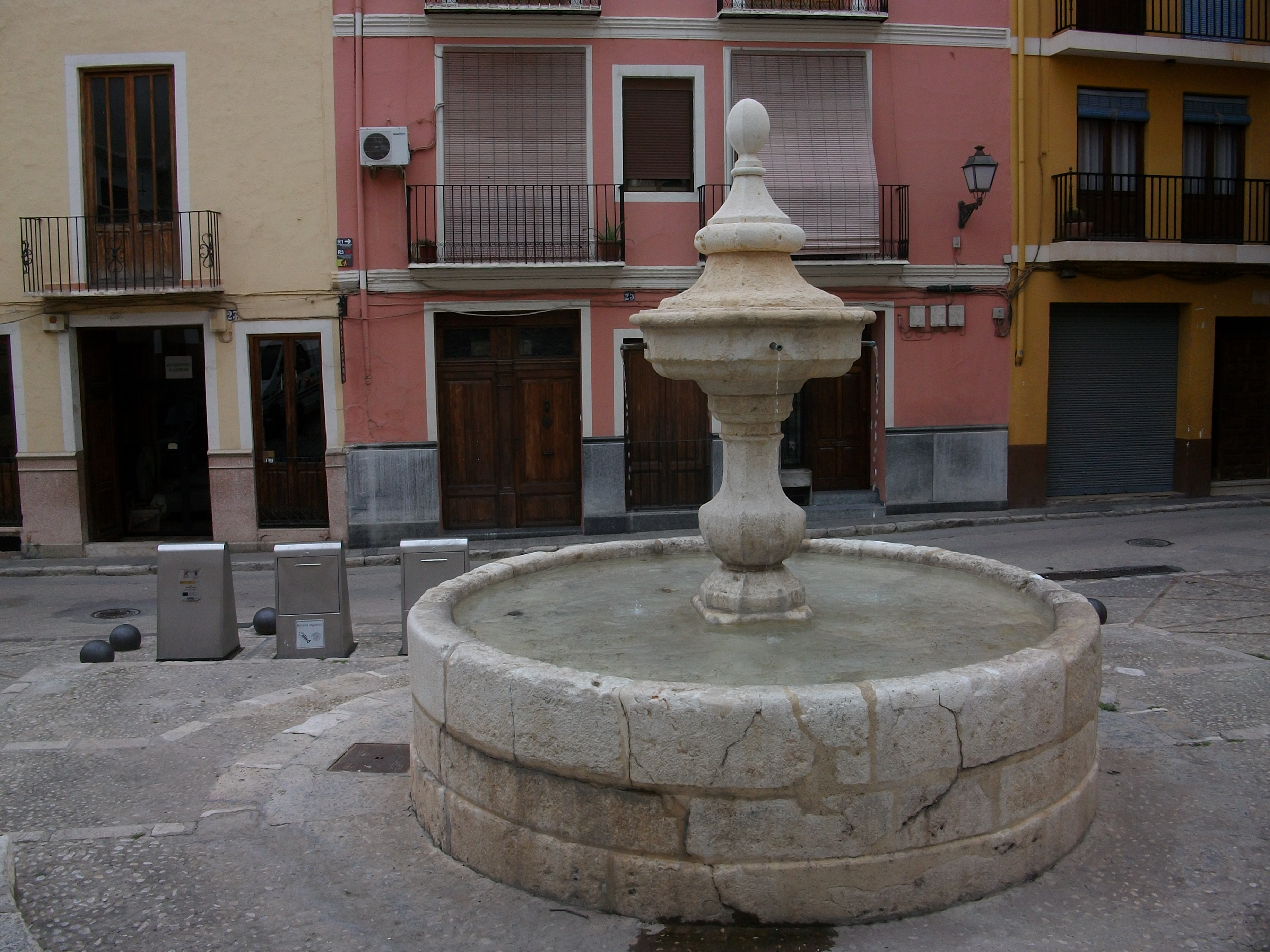 Font Reial d'Aldomar, primera meitat del segle XVIII. Segueix els models gòtics, té planta circular, arbre en forma de balustre i copa poligonal. Xàtiva, la Costera.